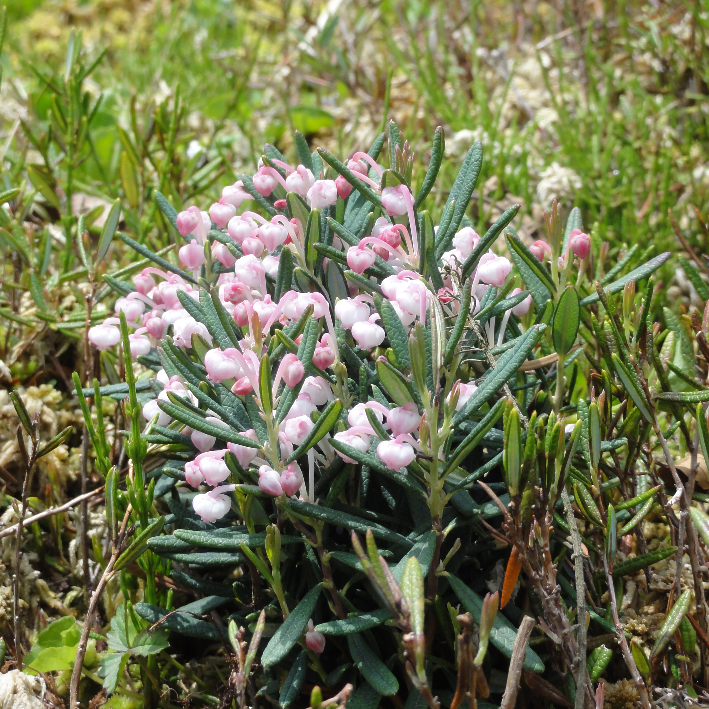 ヒメシャクナゲ[姫石楠花/ニッコウシャクナゲ(日光石楠花)][Andromeda polifolia]-全体